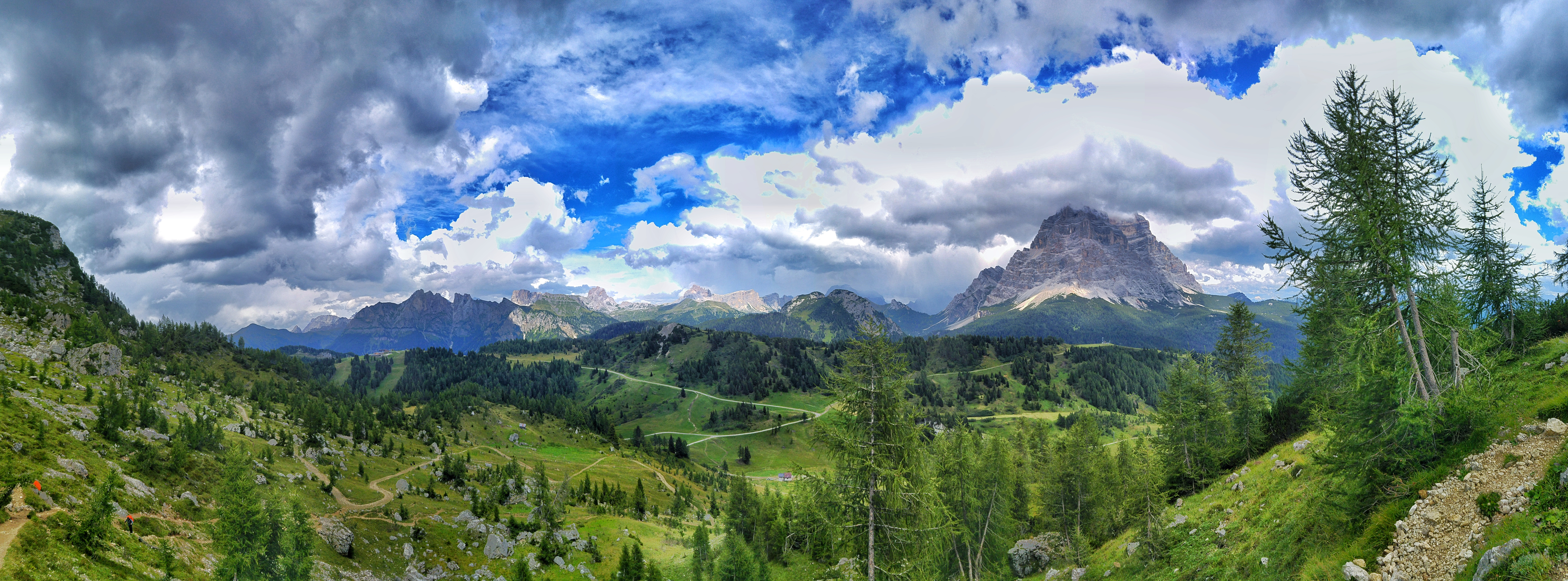 Monte Pelmo - Mondeval - Formin (Q49963345)